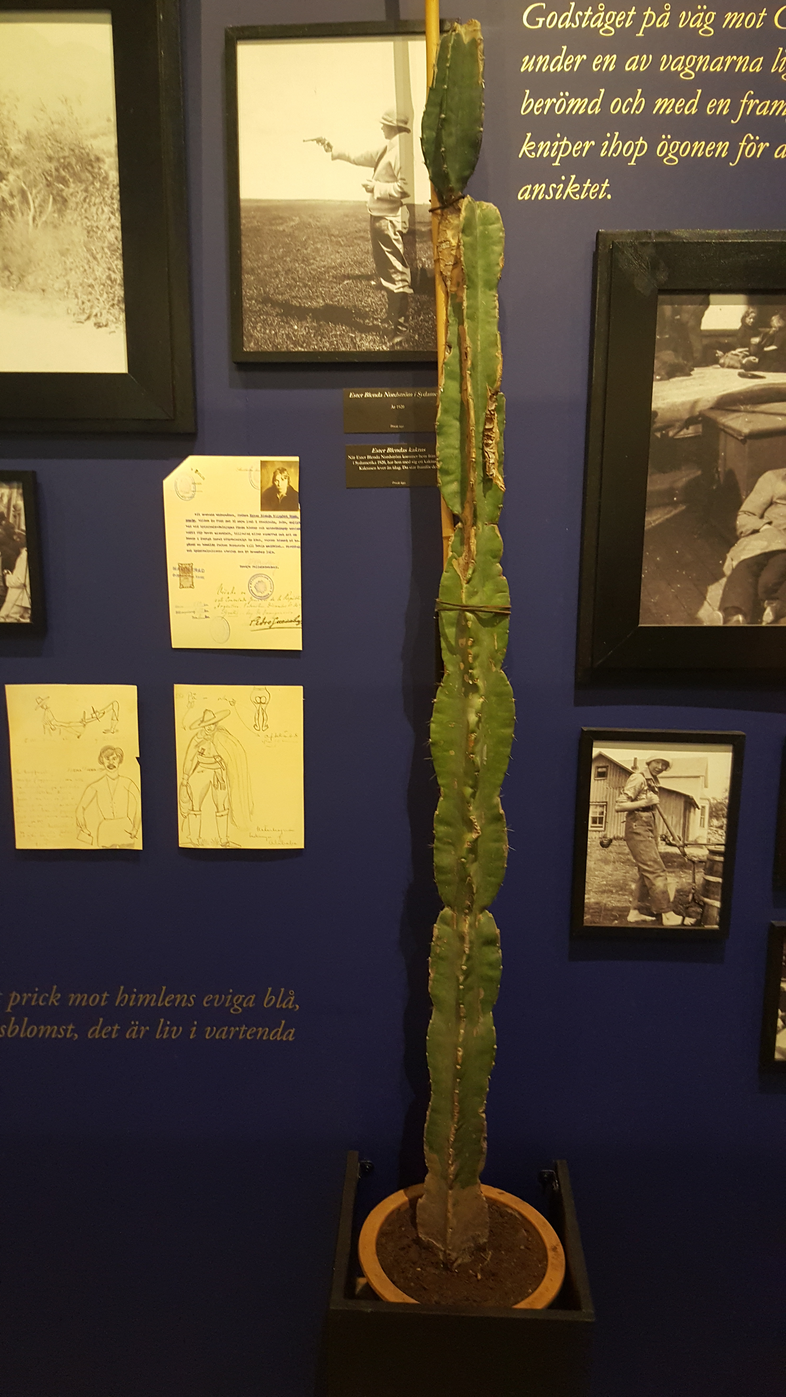 Ester Blenda Nordströms kaktus, på Skarhults slotts utställning om Ester Blenda 2019